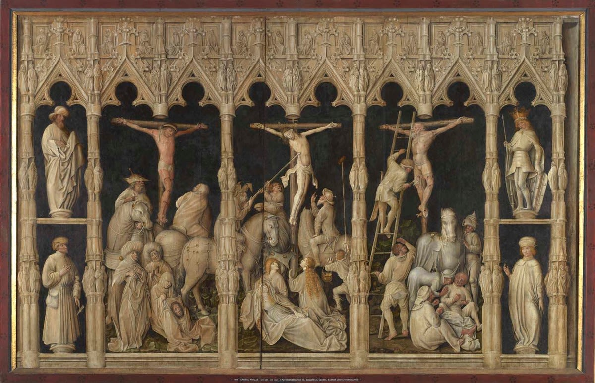 Master of the Tegernsee Altar, Crucifixion (Nuremberg, Ger. Nmus.)